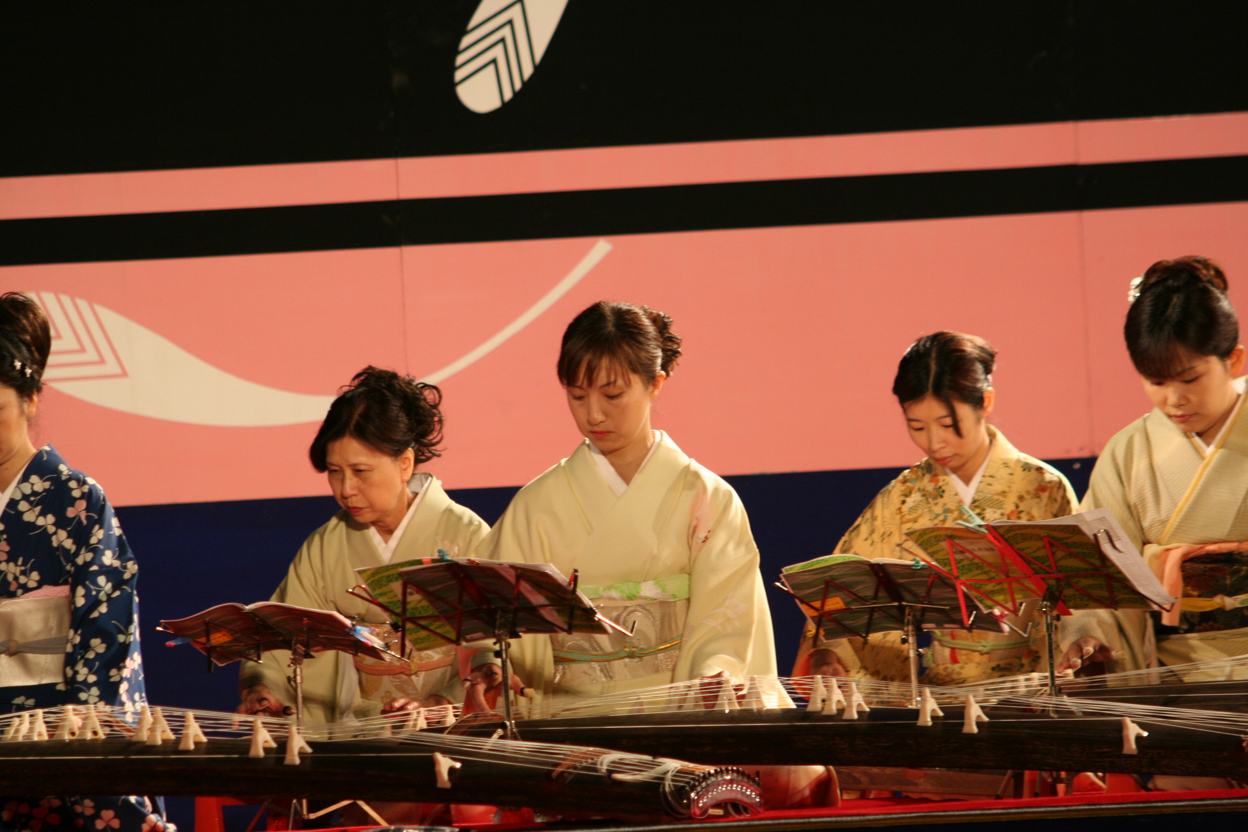 2009年10月3日に姫路城三の丸広場にて開催された姫路城観月会の模様。